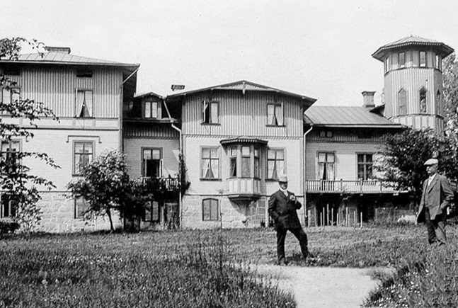 Fredensborgs herrgård från gårdssidan